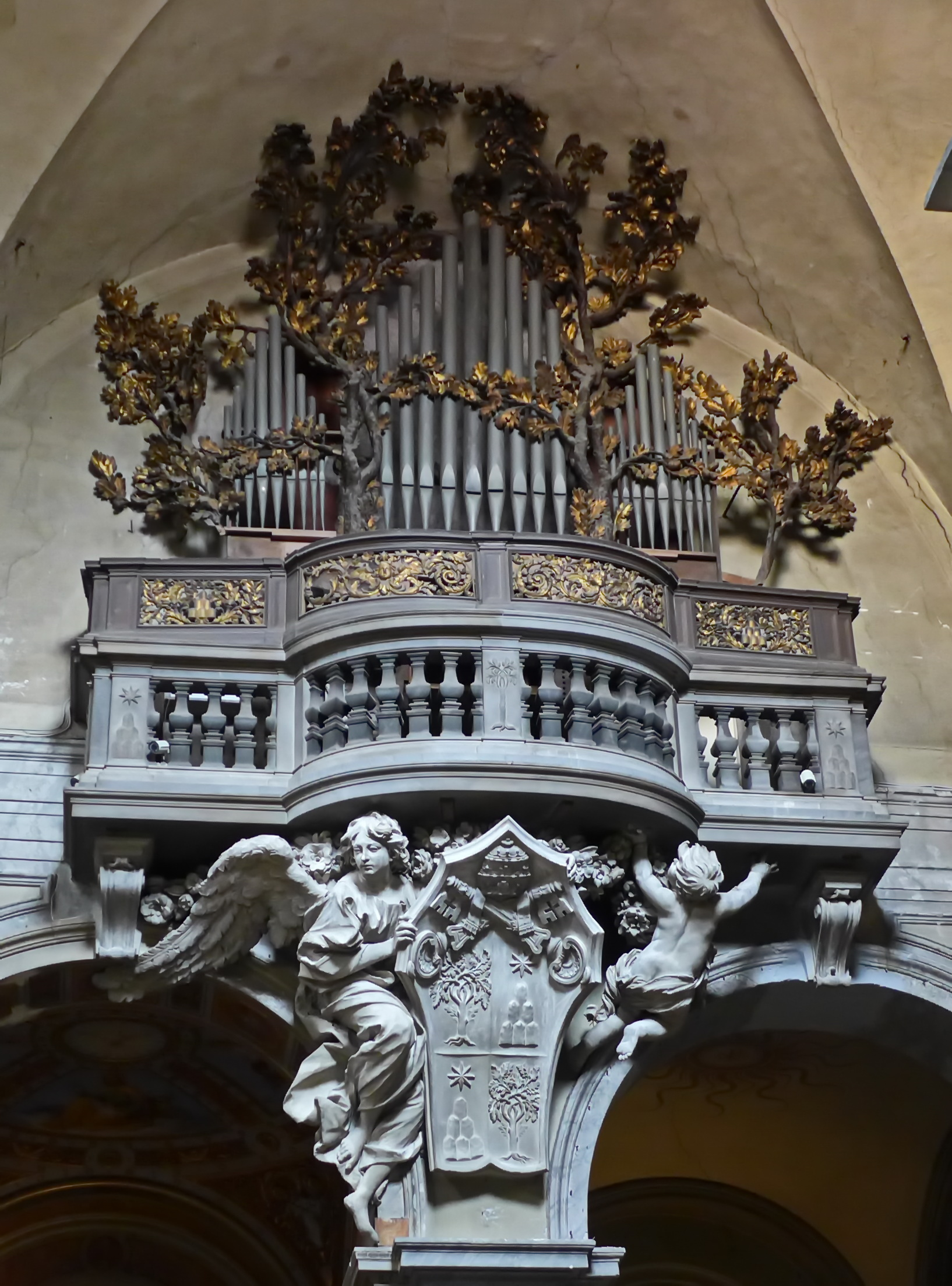 Santa Maria Del Popolo Spevi Orgel